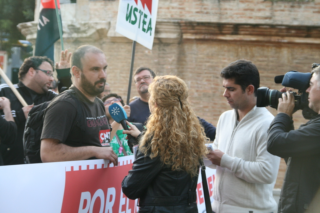 Manifestación del bloque crítico. 14nhuelgasinmiedo.eu/